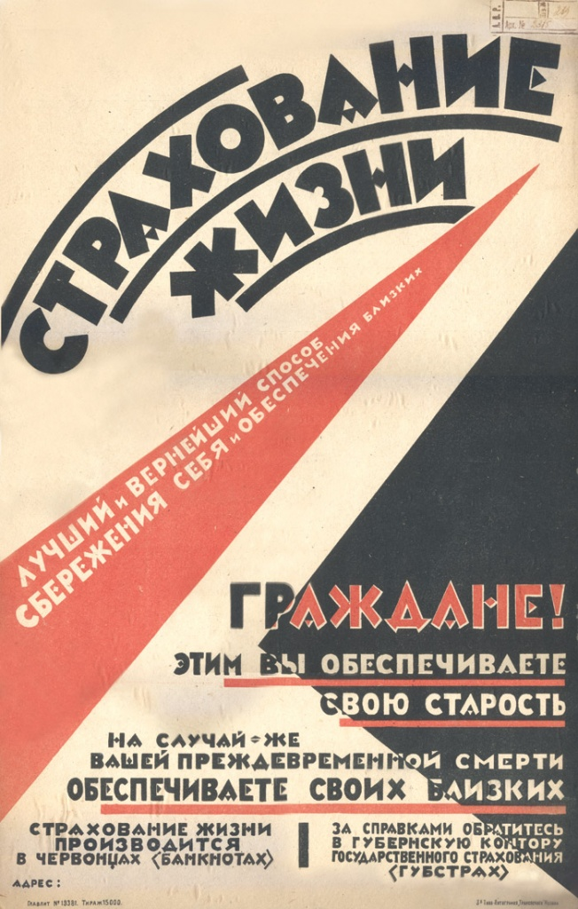 Плакат ГОССТРАХа СССР посвященный страхованию жизни.